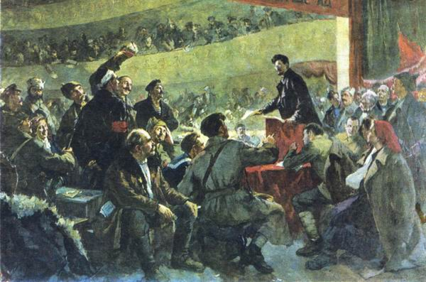 Першы Усебеларускі Зьезд Саветаў